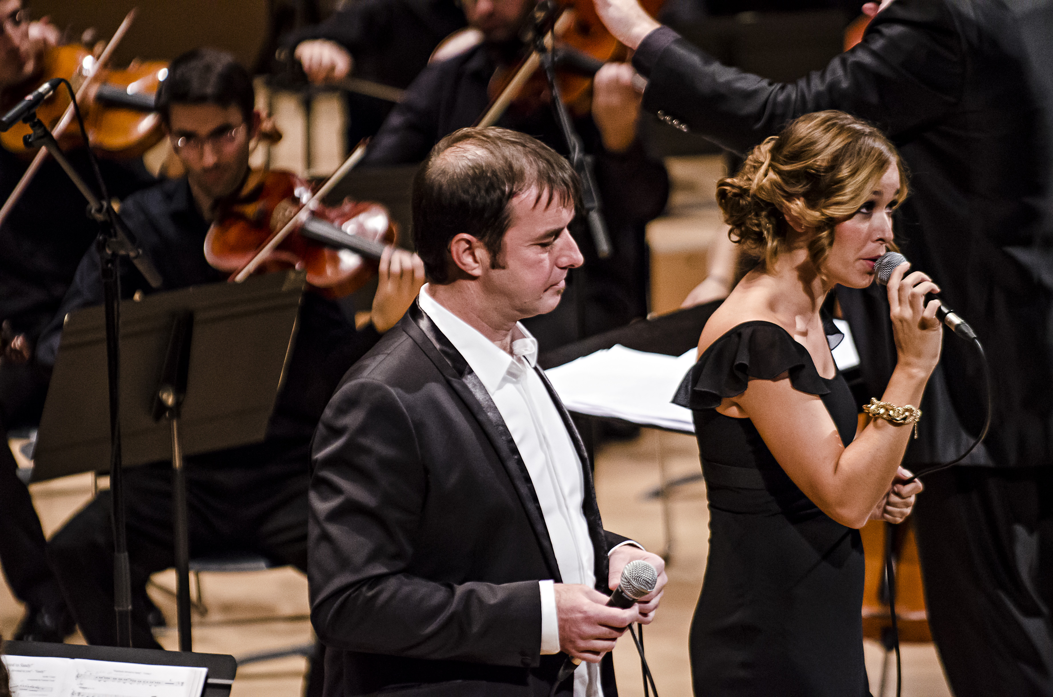 Simfònica de Cobla i Corda de Catalunya amb Beth i Cris Juanico